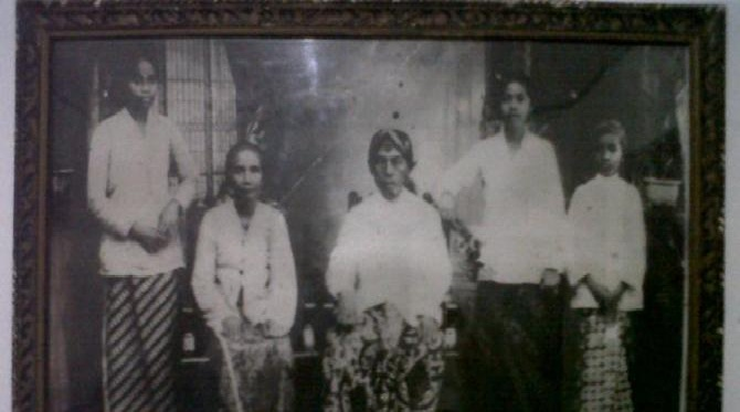 Kakek Tole Iskandar Kota Depok